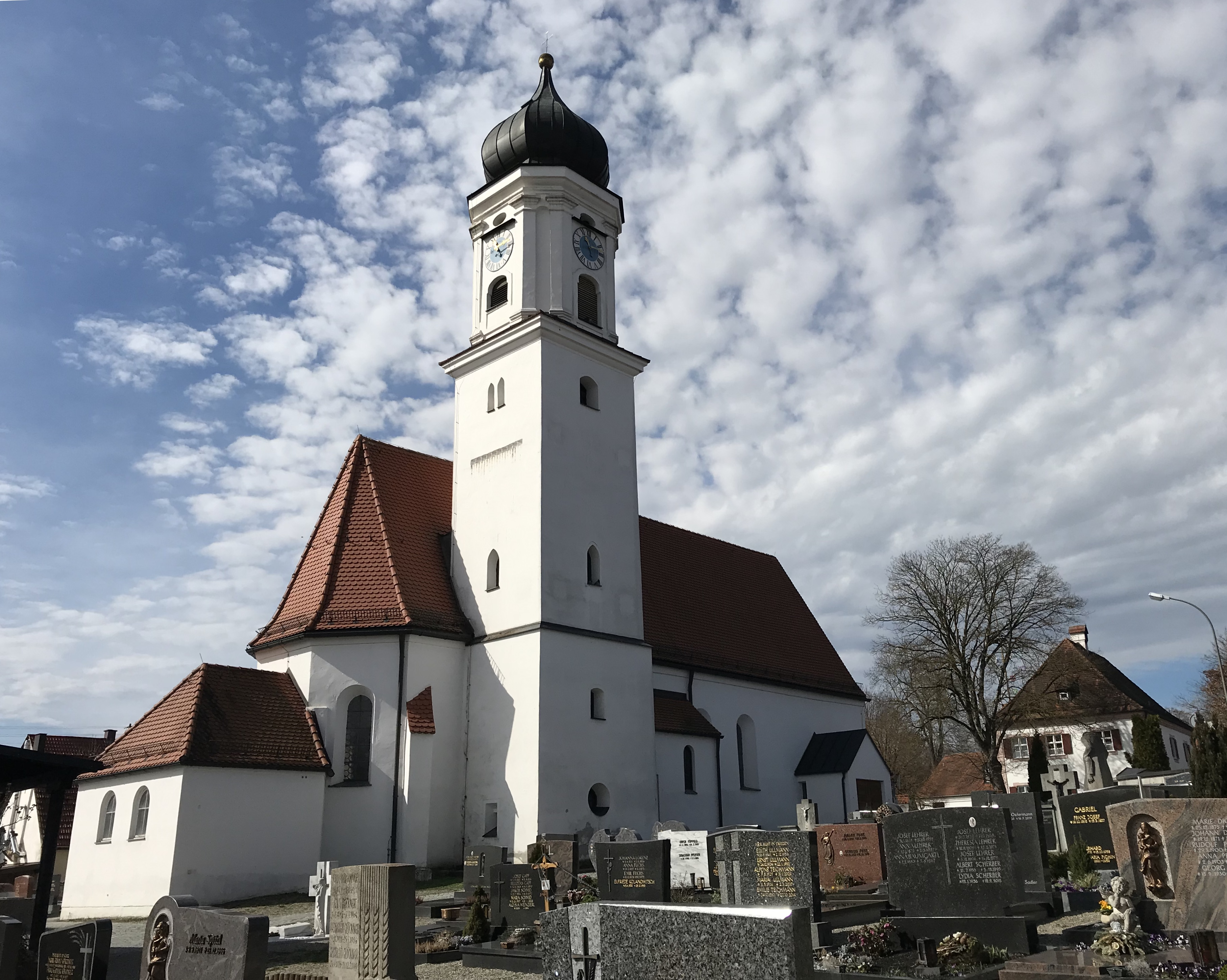 Saalbau mit Zwiebelturm, Westfassade mit Lisenengliederung, Langhaus 12. Jahrhundert, Chor und Turmunterbau 15. Jahrhundert, Umgestaltung um 1710/20, Erweiterung 1863/64. Bayerische Denkmalliste Nr. D-7-71-113-75